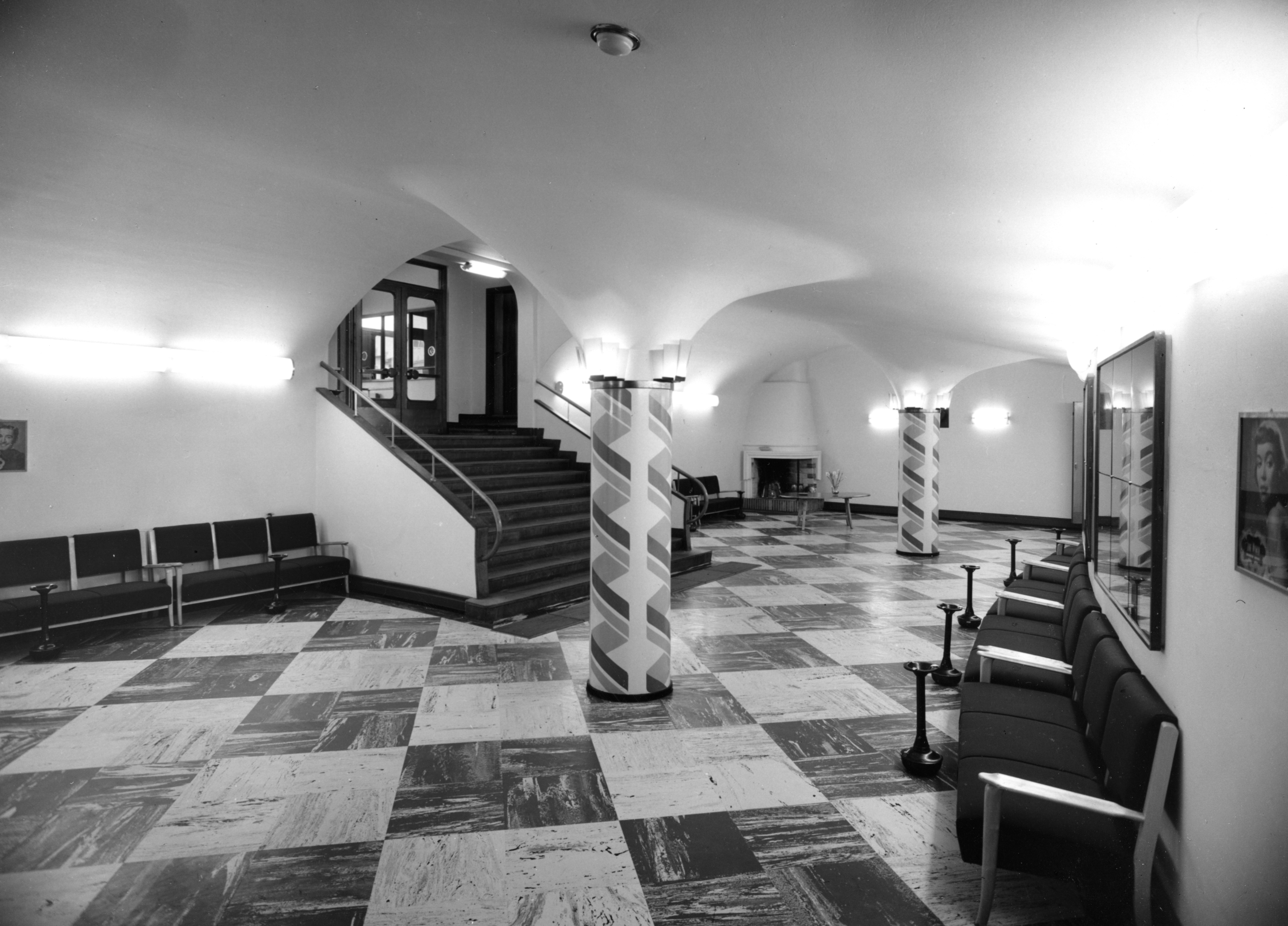 Fram Kino